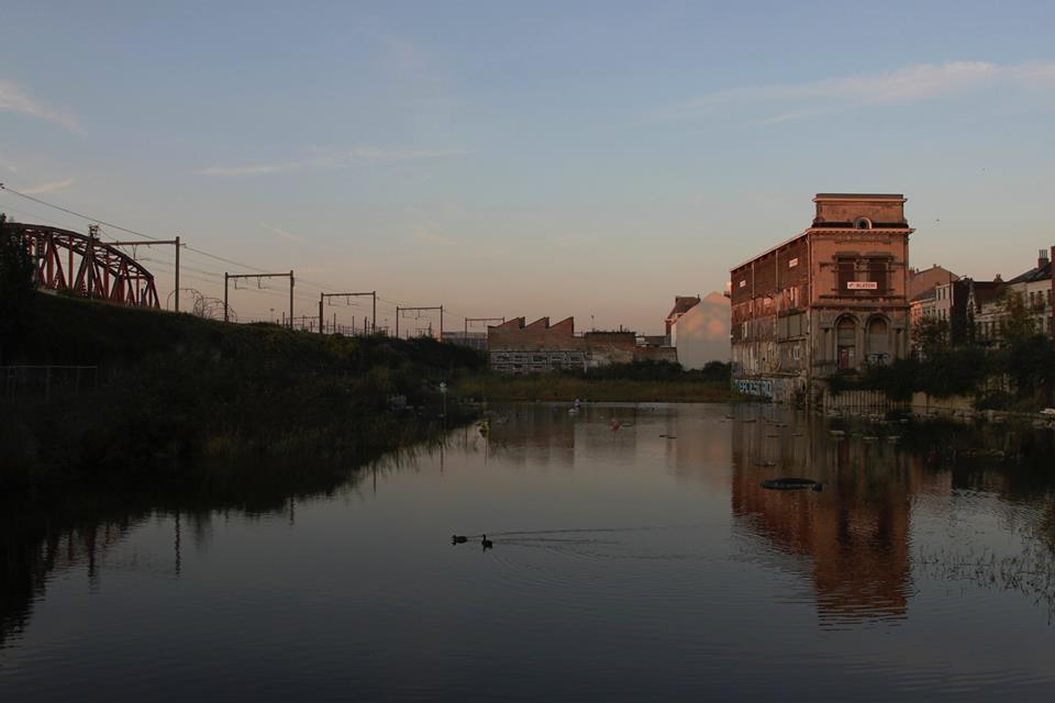 Etang derrière un bâtiment désaffecté de la brasserie Wiels, près du bâtiment Blomme. Vue vers la gare du Midi.